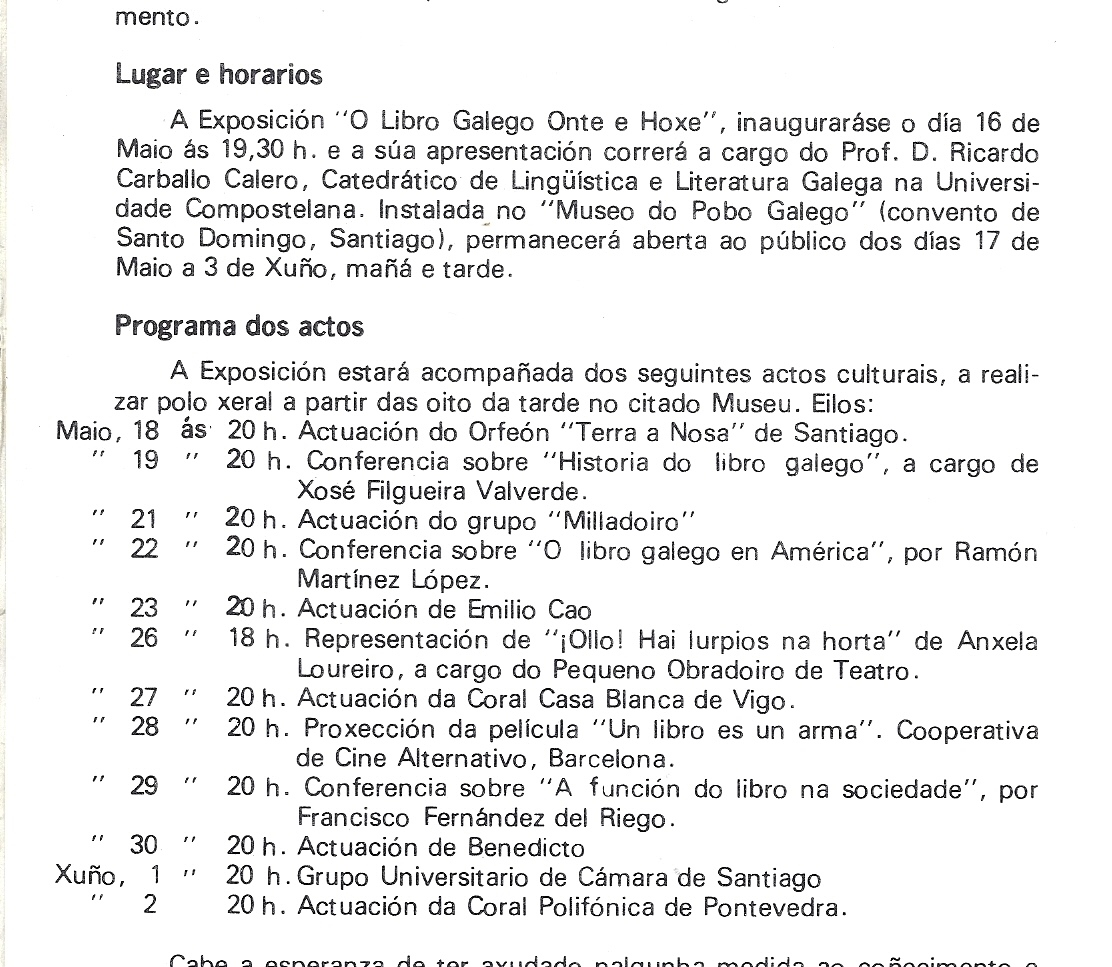 Actos da exposición O libro Galego Onte e Hoxe